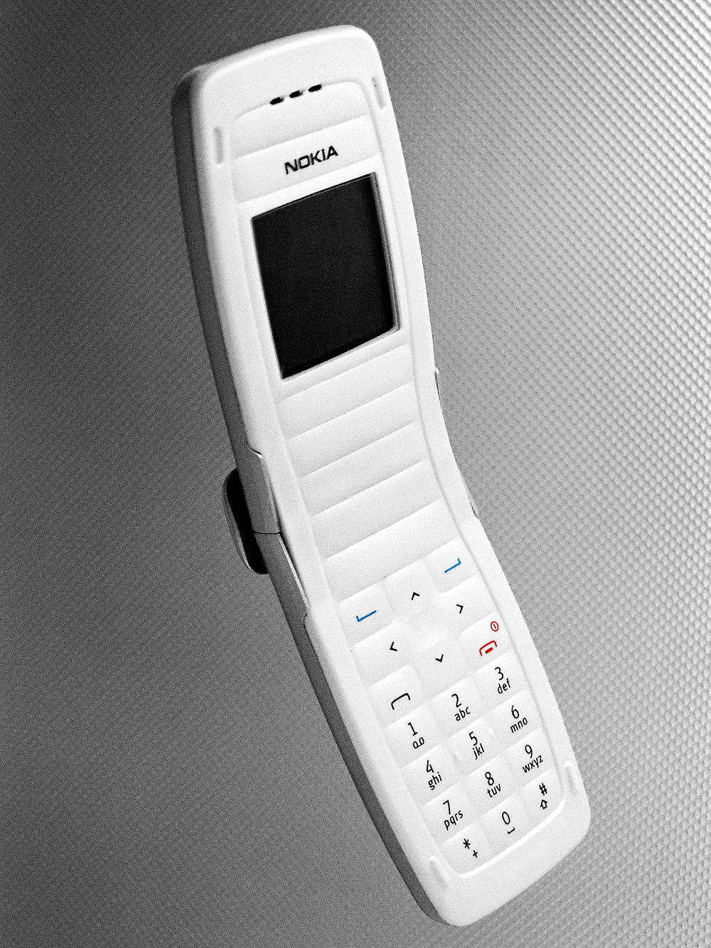 Teléfono móvil Nokia 2650.